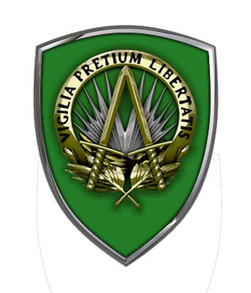 Szövetséges Erők Európai Főparancsnoksága logo